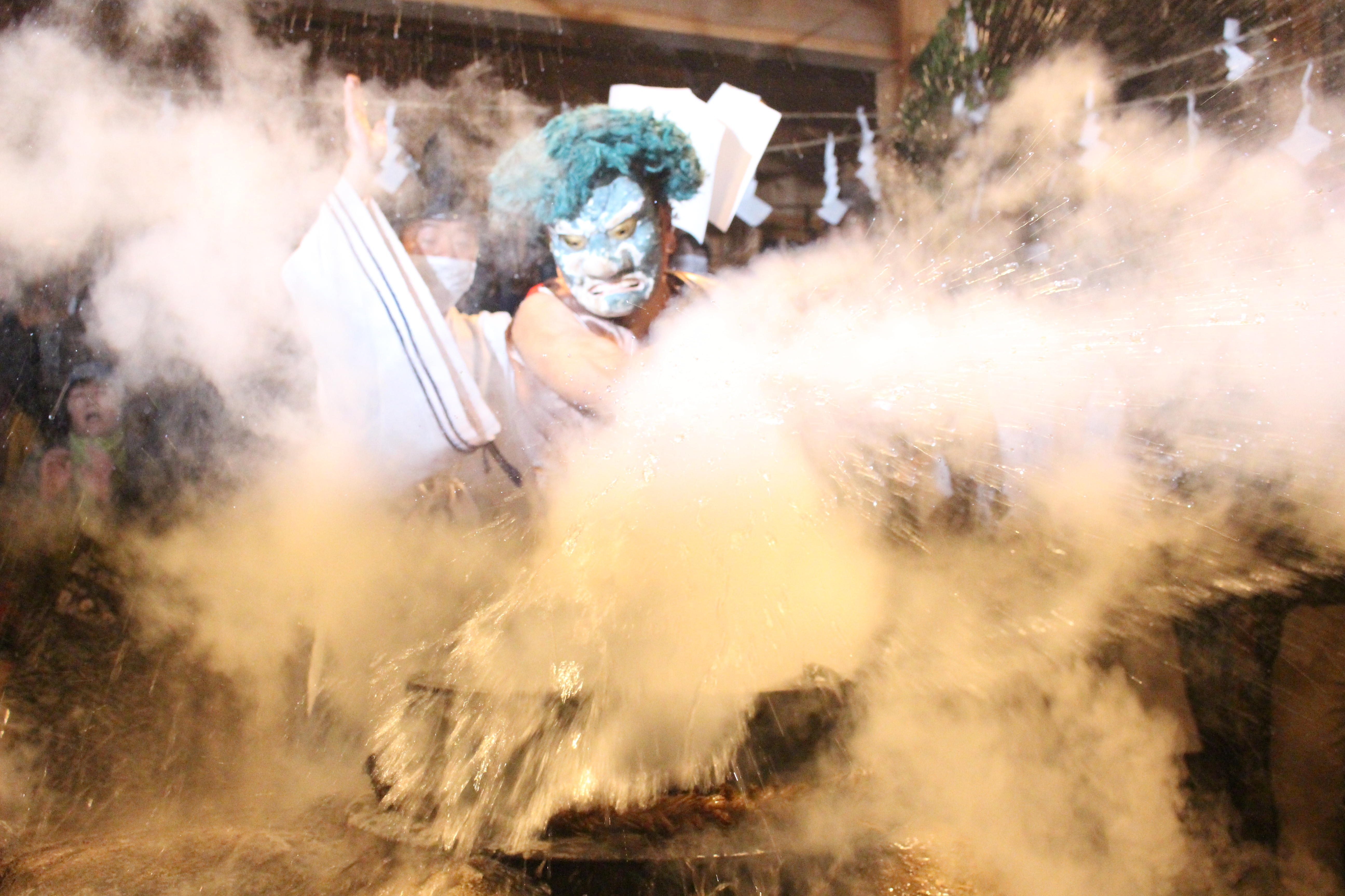 四面様という神様が、釜の熱湯を素手で跳ね飛ばします。下栗、木沢タイプでは大天狗様と小天狗様、和田では水の王様が湯切りをします。